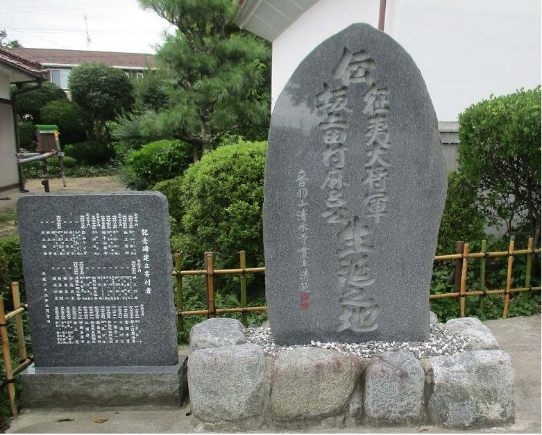 坂上田村麻呂生誕の地